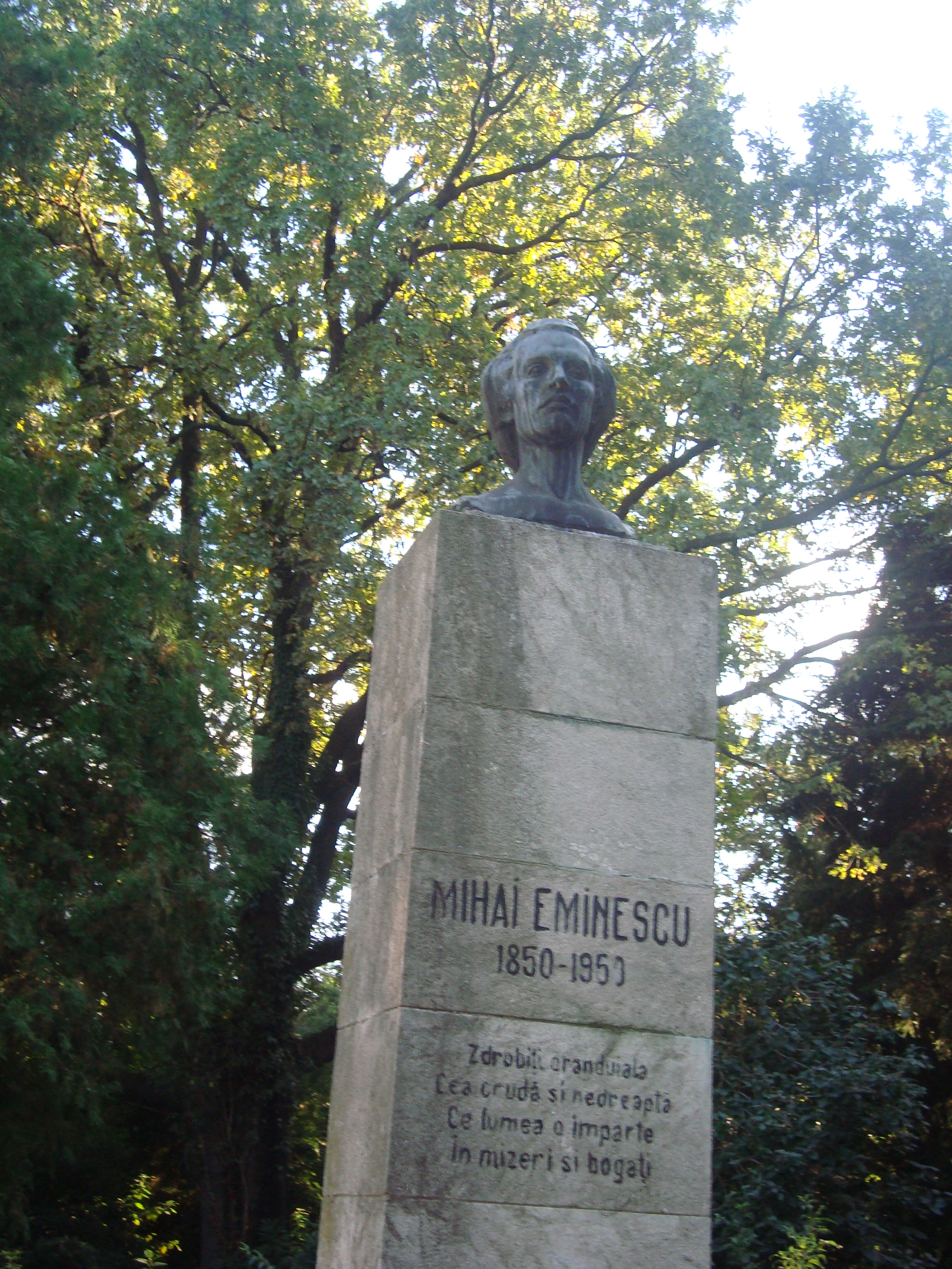 Statuia lui Eminescu